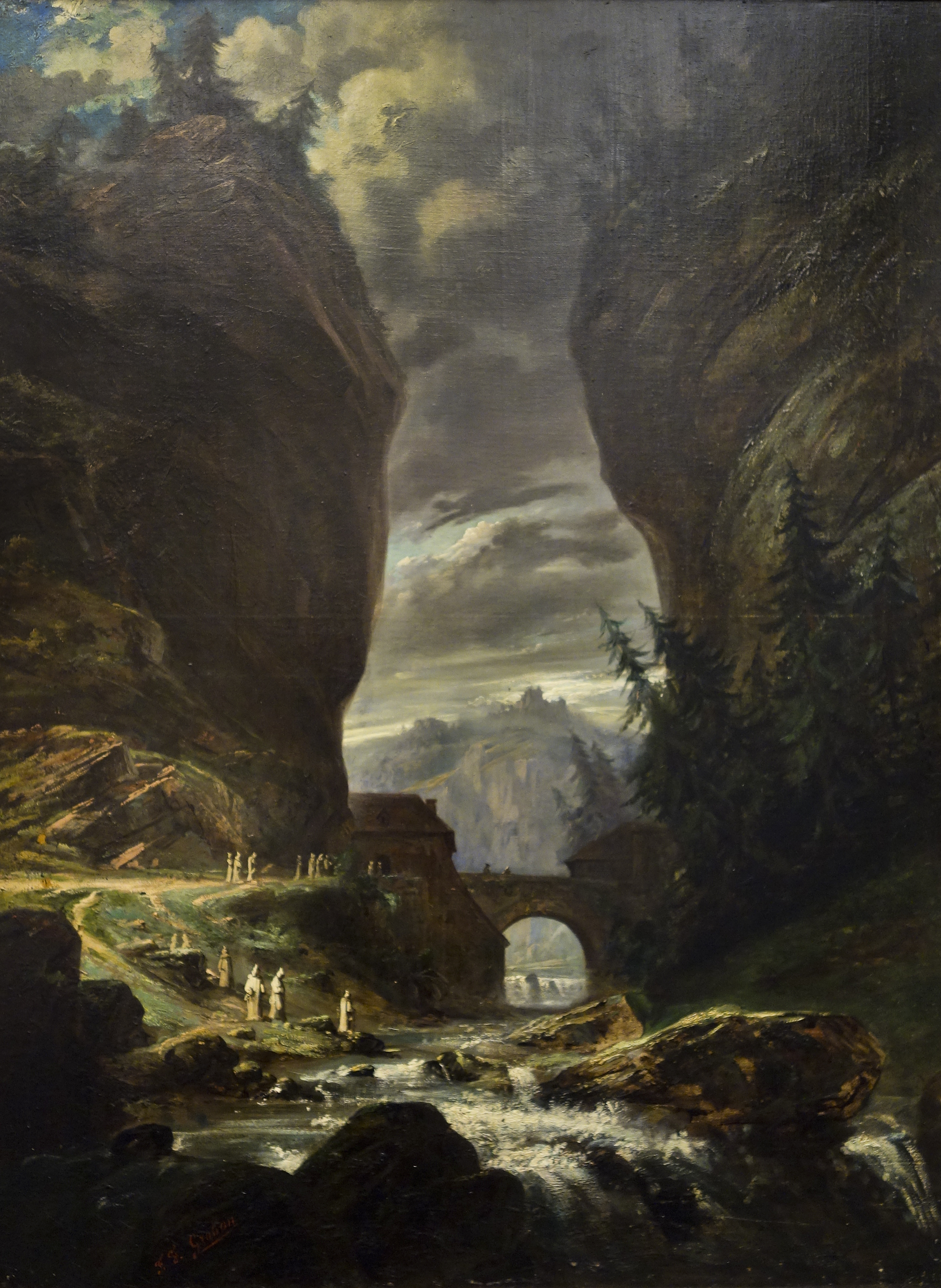 Porte de la Grande Chartreuse par François-Frédéric Grobon (né en 1815, mort en 1901/1902). Musée Faure, Aix-les-Bains